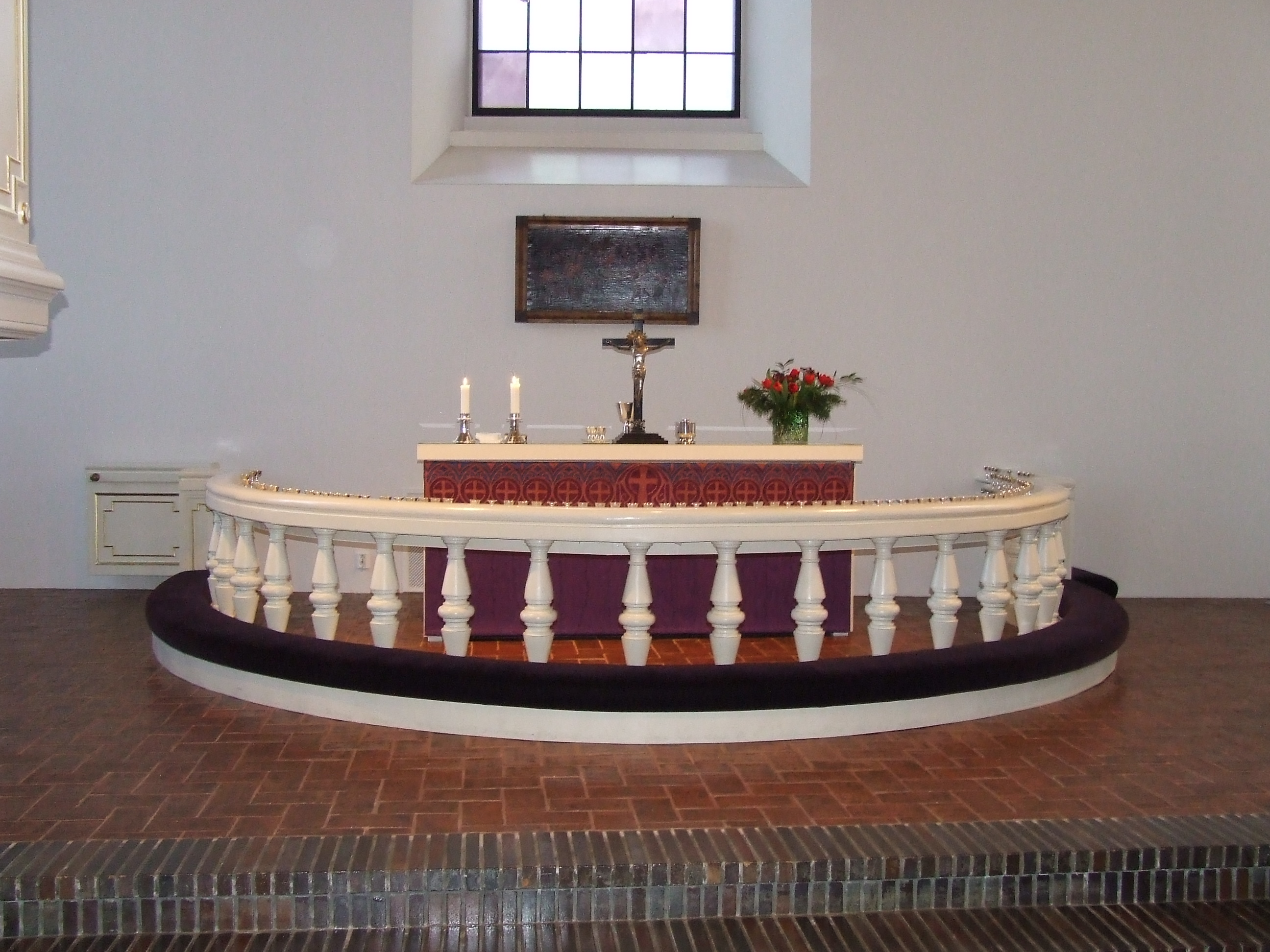 Haminan Marian kirkon alttari